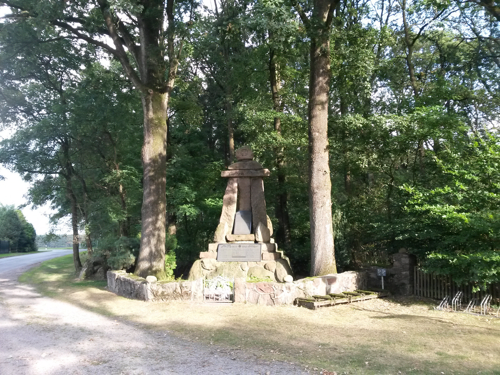 Kriegerdenkmal Gross Todtshorn